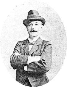 Makó Lajos magyar színész, színigazgató.